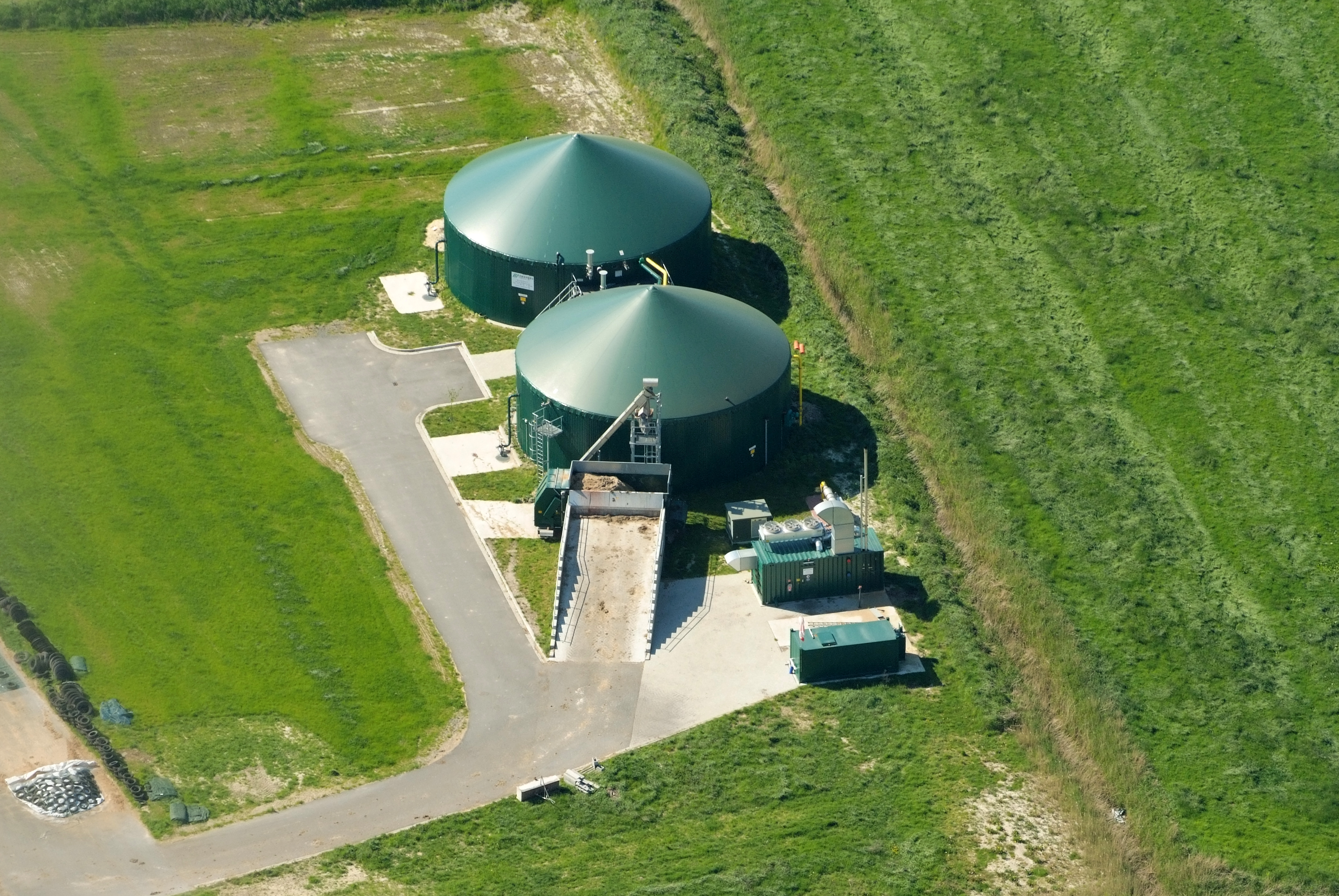 Fotoflug vom Flugplatz Nordholz-Spieka über Bremerhaven, Wilhelmshaven und die Ostfriesischen Inseln bis Borkum